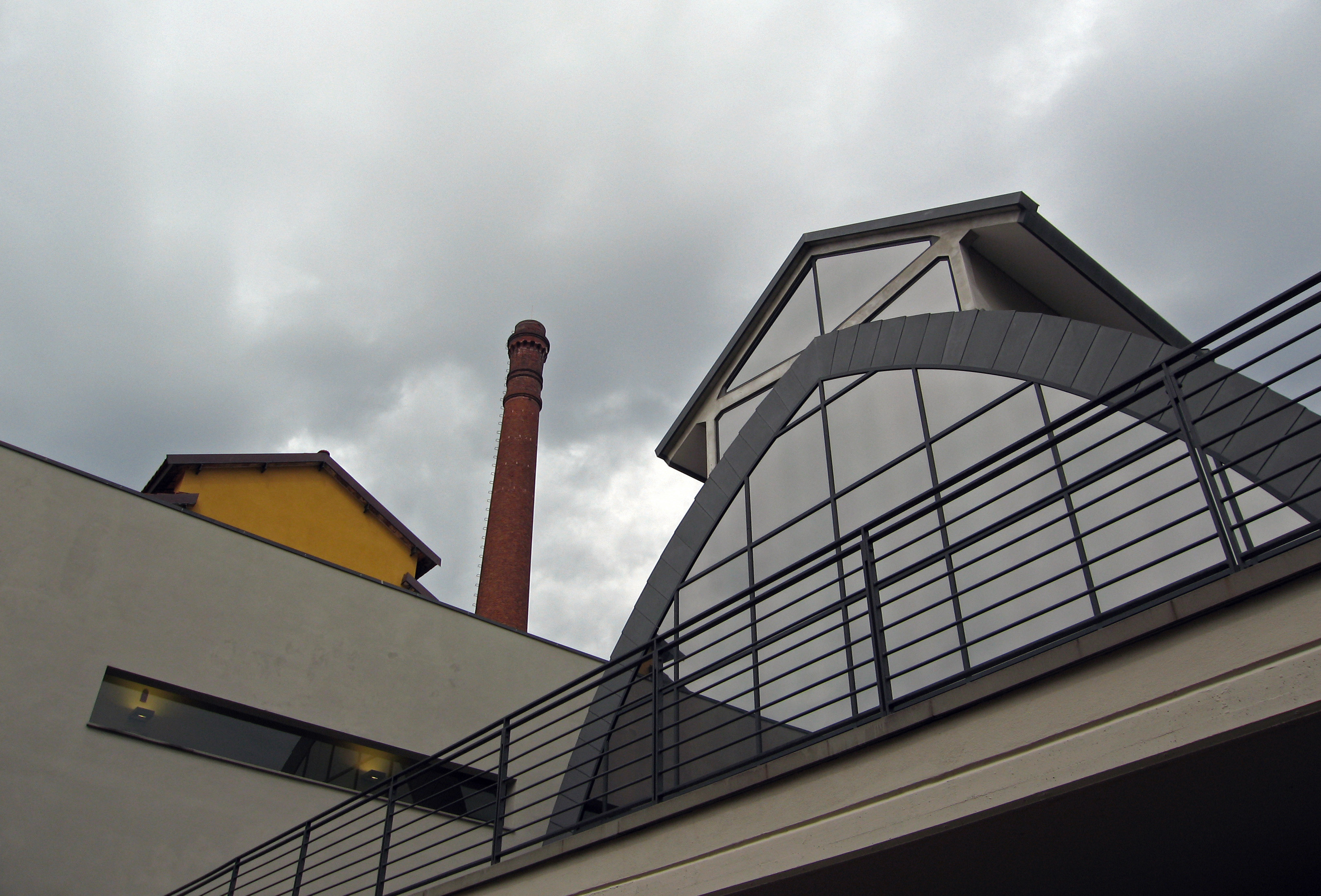 Biblioteca Lazzerini (ex fabbrica Campolmi) This is a photo of a monument which is part of cultural heritage of Italy.